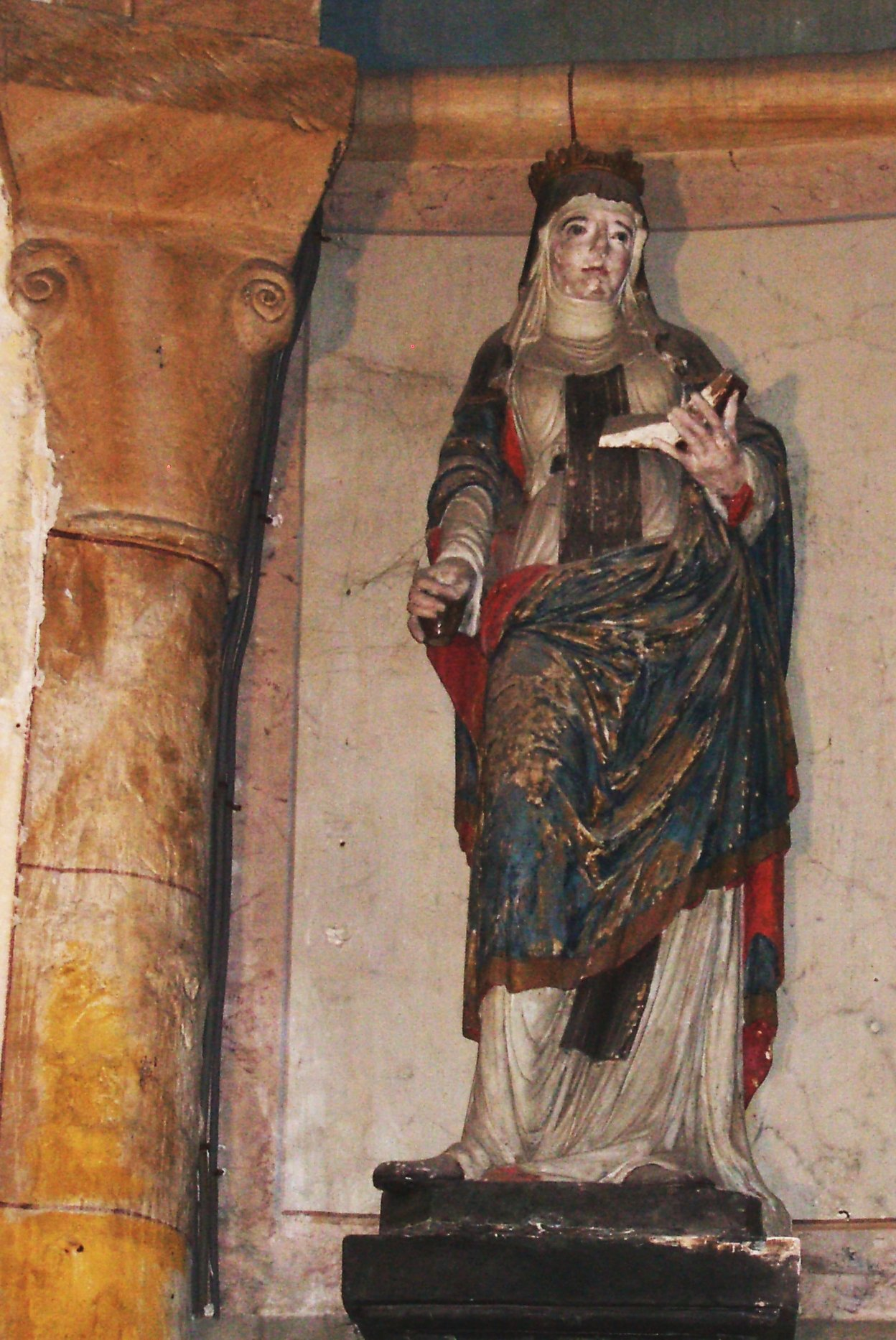 Sainte Radegonde dans l'église de Giverny (Eure)